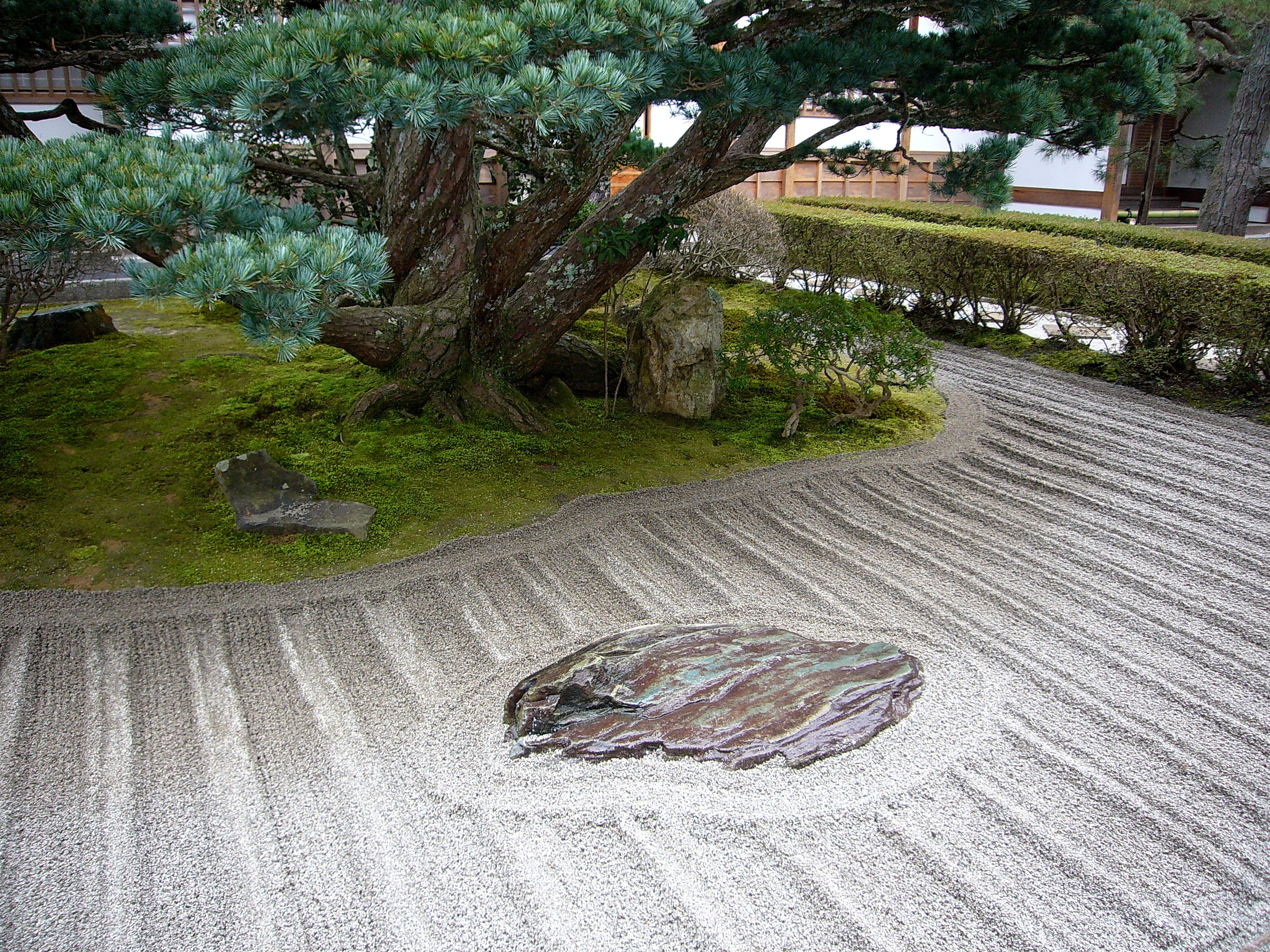 銀閣寺 Ginkaku-ji Temple